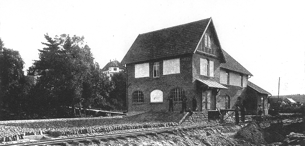 Bahnhof Neuenstadt am Kocher